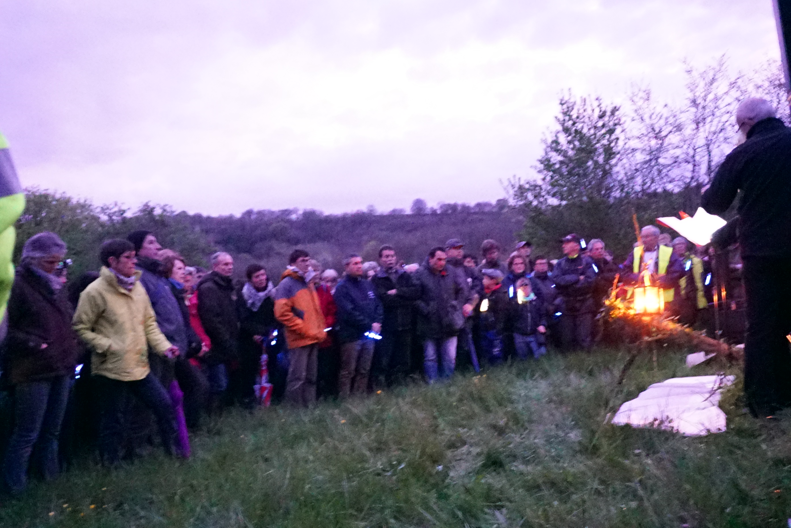 Lors de la commémoration de l'offensive Nivelle. Marche entre Craonne et Craonnelle.